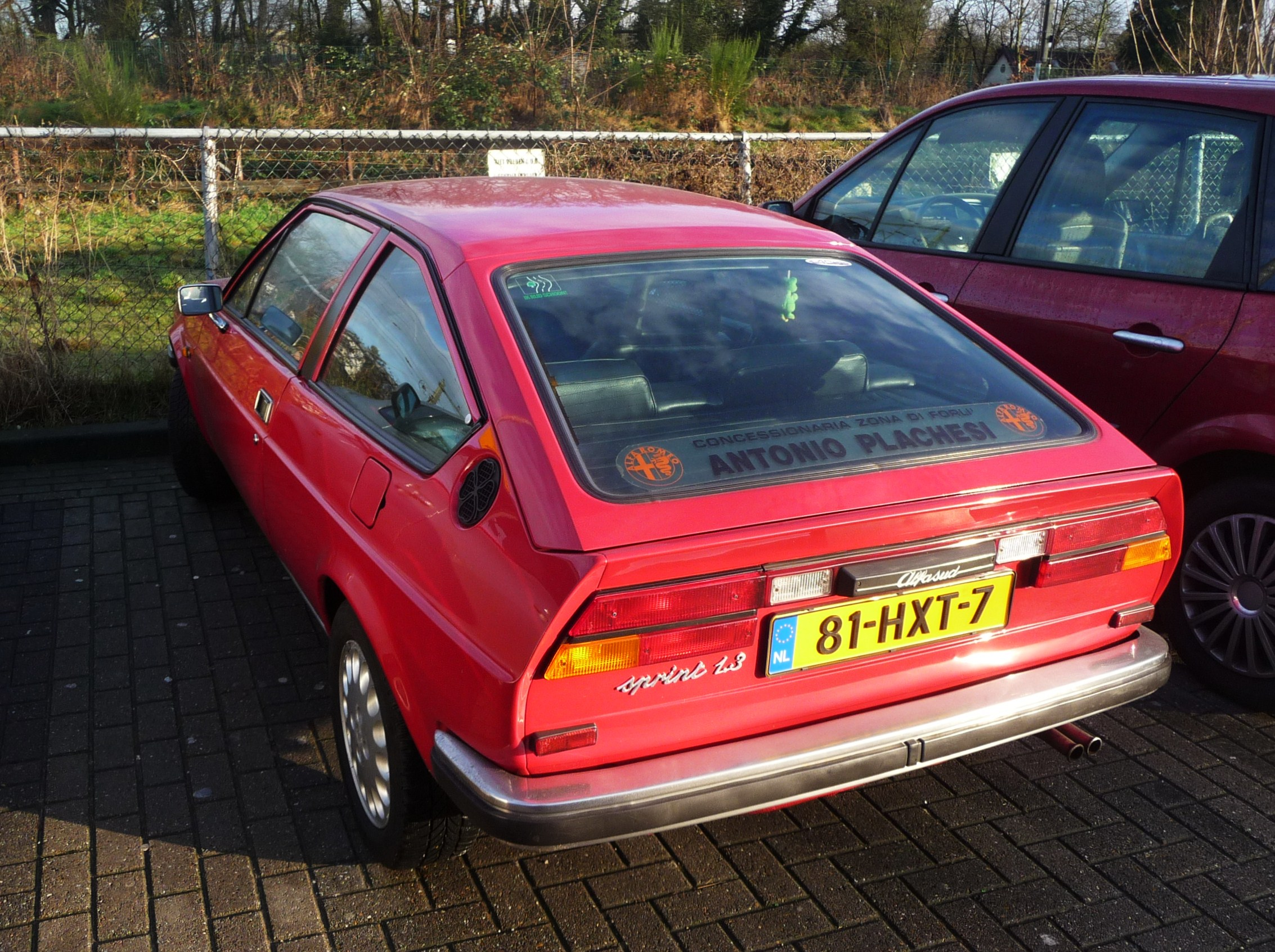 81-HXT-7